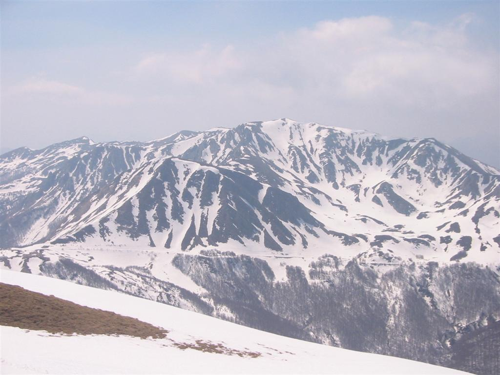 Monte Prado dal Monte Cusna